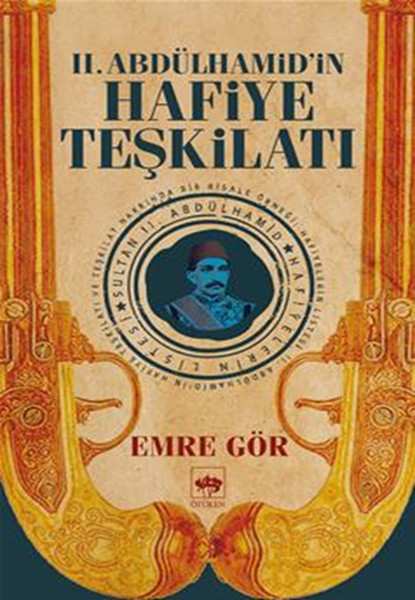 2. Abdülhamid'in Hafiye Teşkilatı